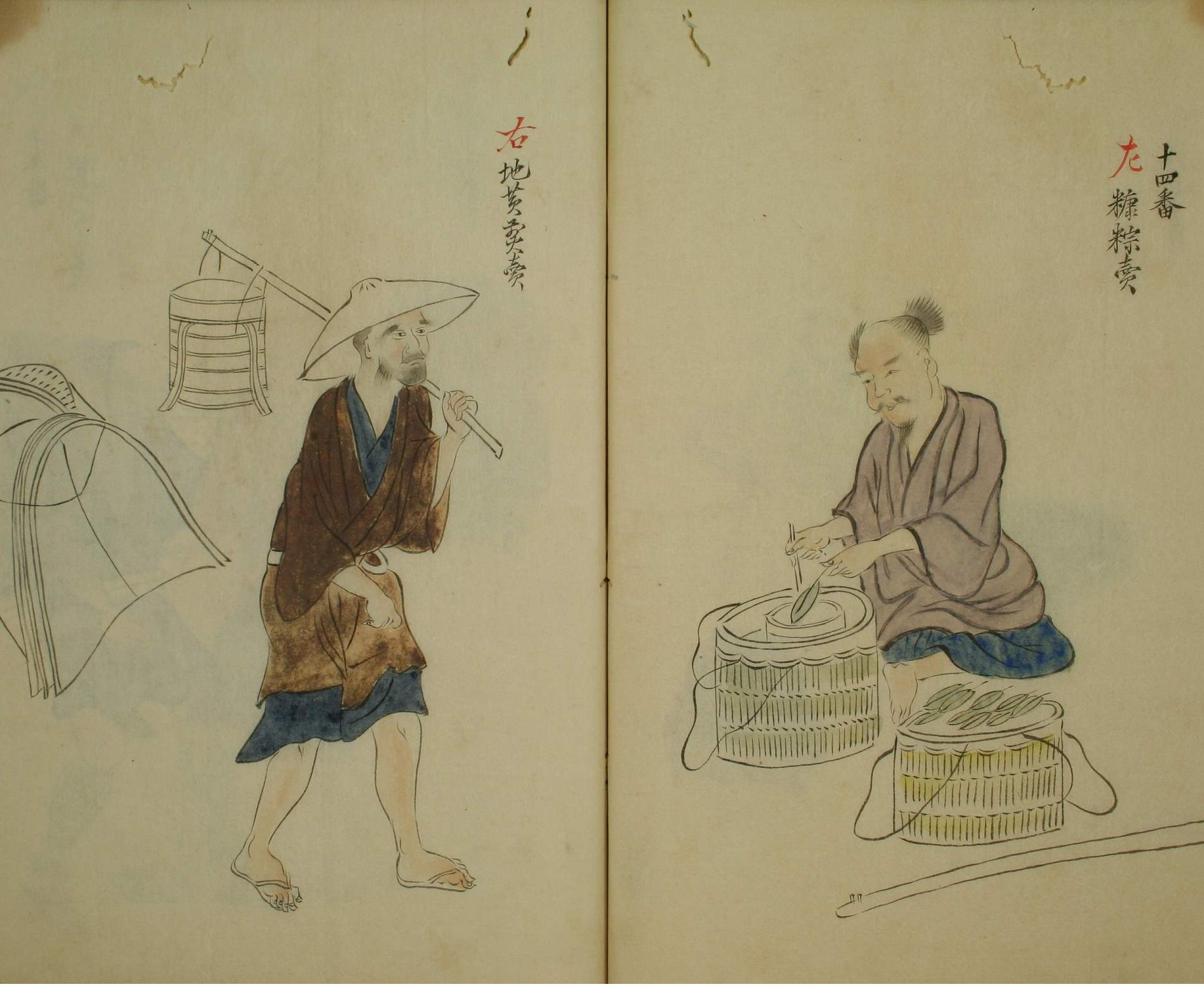 三十二番職人歌合』、垂恵 (?)、1494年の1838年模写